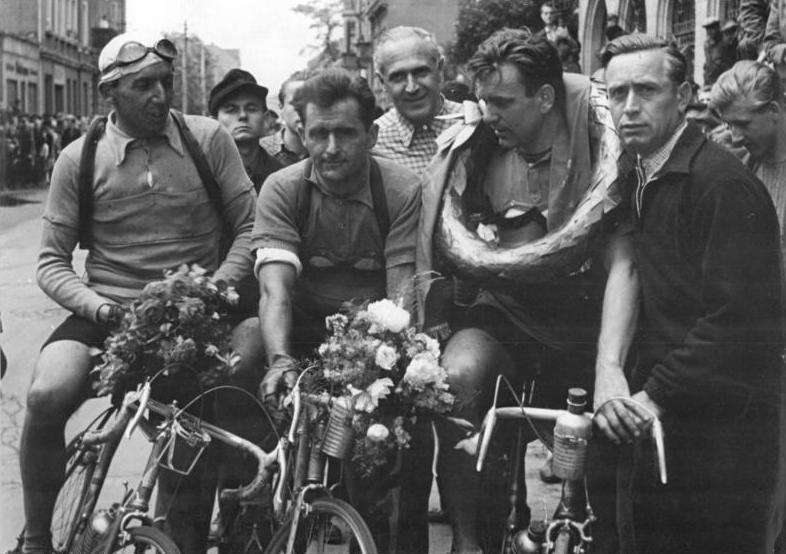 Nickel, B. Trefflich, P. Dinter, H. Gaede Zentralbild Siegert 1.6.1953 Erster Lauf der DDR-Meisterschaft im Straßenfahren Am 31.5.1953 wurde von Riesa aus der erste Lauf der Meisterschaften der Deutschen Demokratischen Republik im Straßenfahren ausgetragen. Im Anschluß an das Rennen besichtigten die Meister des Sportes Lothar Meister, Bernhard Trefflich, Gustav-Adolf Schur und Paul Dinter auf Einladun des Werkleisters, Held der Arbeit, Max Friedemann das Stahl- und Walzwerk Riesa. UBz: Nach dem Rennen. Von rechts nach links: Trainer Nickel, der Sieer Trefflich, der Zweite dinter, der Dritte Horst Gaede.